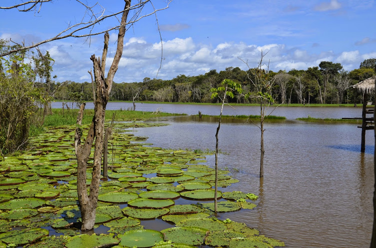 Lago do Rio Negro no período da enchente.